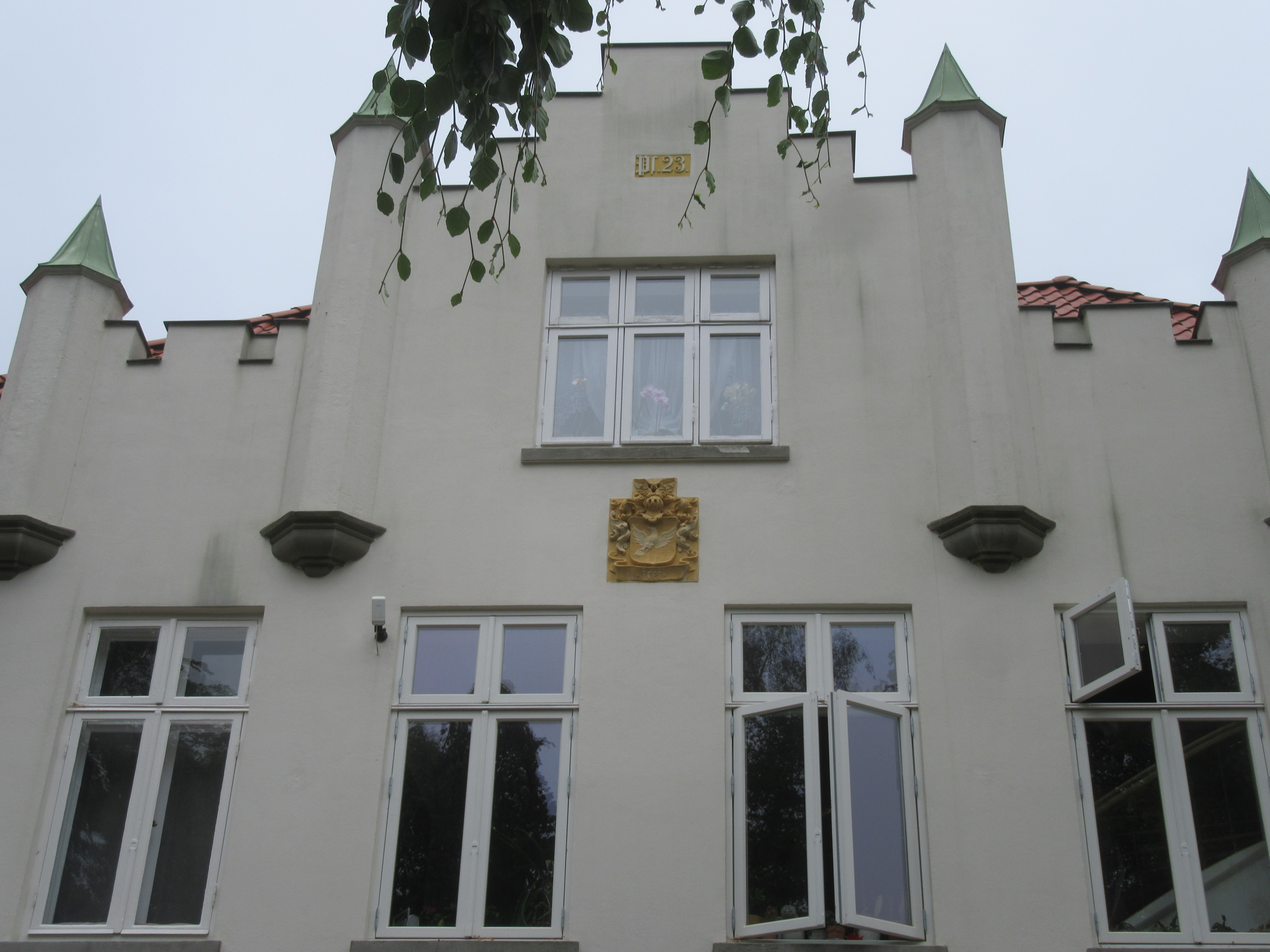 Herrenhaus Hohewarte (Lübeck)